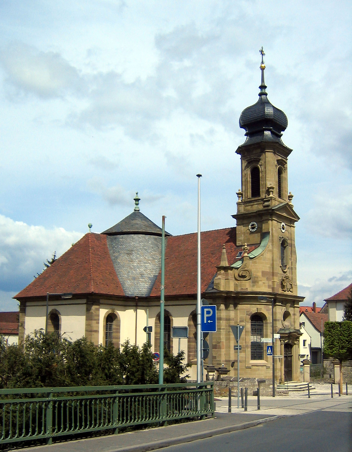 Balthasar Neumanns Kreuzkapelle im Kitzinger Stadtteil Etwashausen